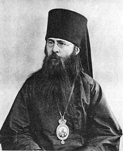 Ректор Санкт-Петербургской духовной академии Сергий (Страгородский) (1867-1944)